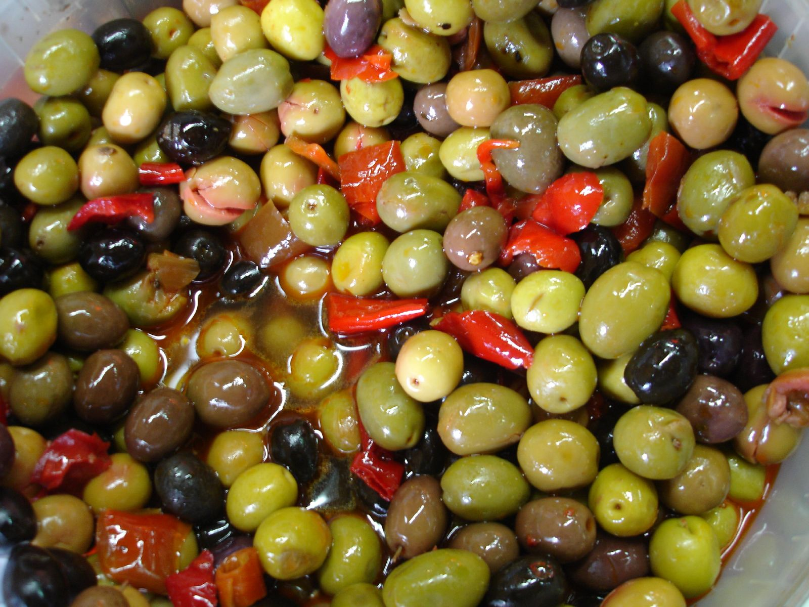 Some Olives